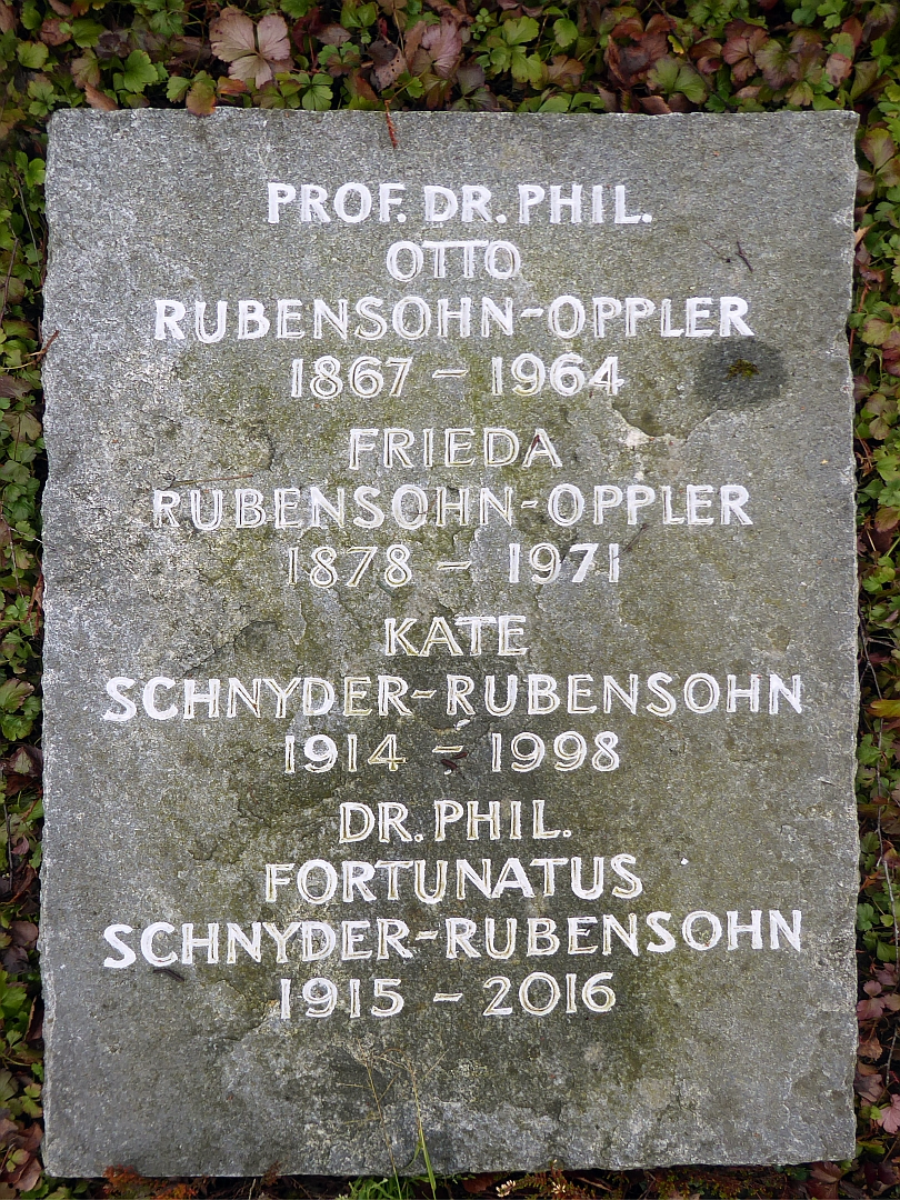 Otto Rubensohn-Oppler (1867–1964) Dr.phil. Professor, Archäologe, Erforschung von Paros, Werk-Das Delion von Paros. Familiengrab auf dem Friedhof Hörnli, Riehen, Basel-Stadt